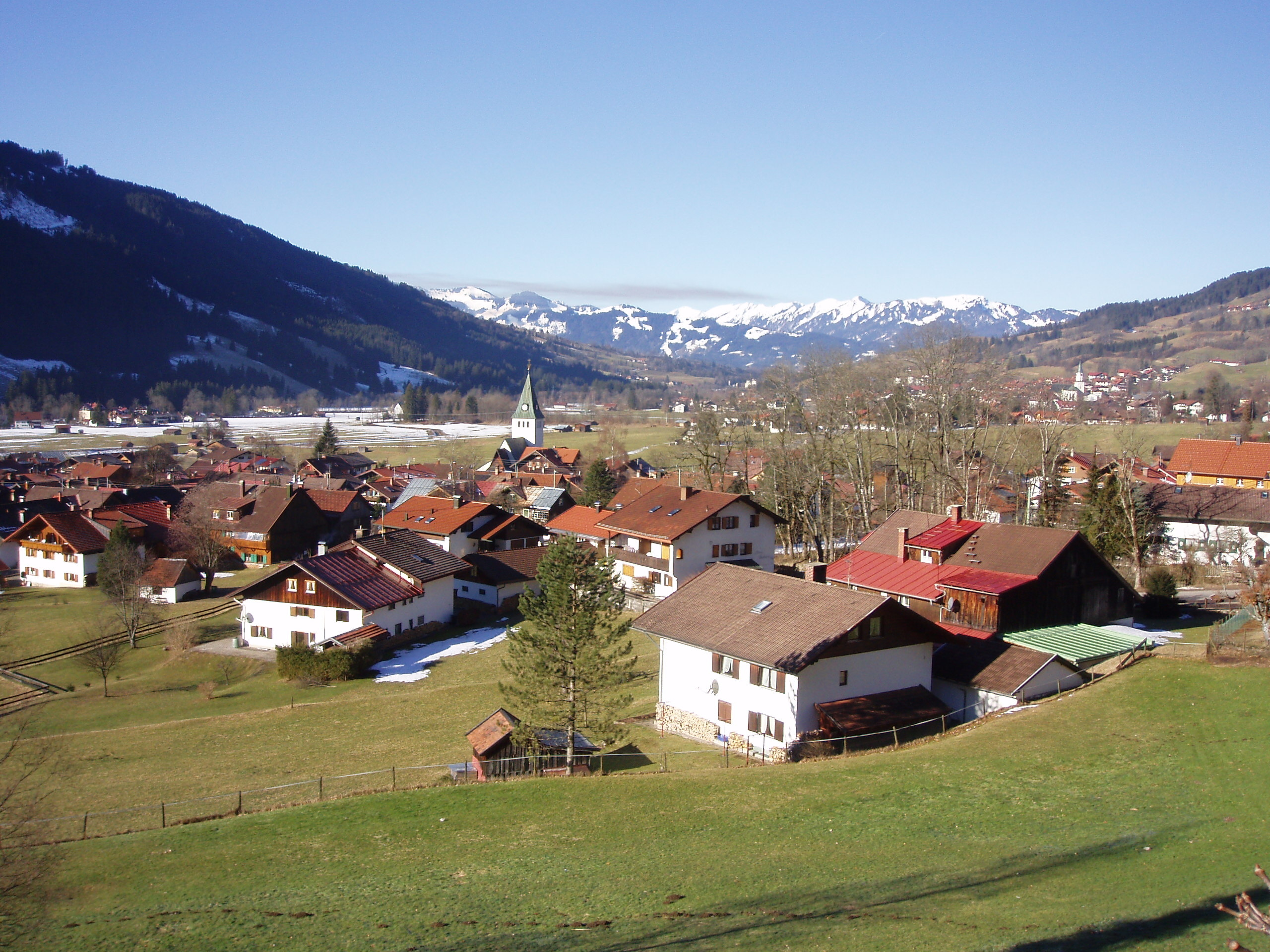 Blick über Bad Oberdorf